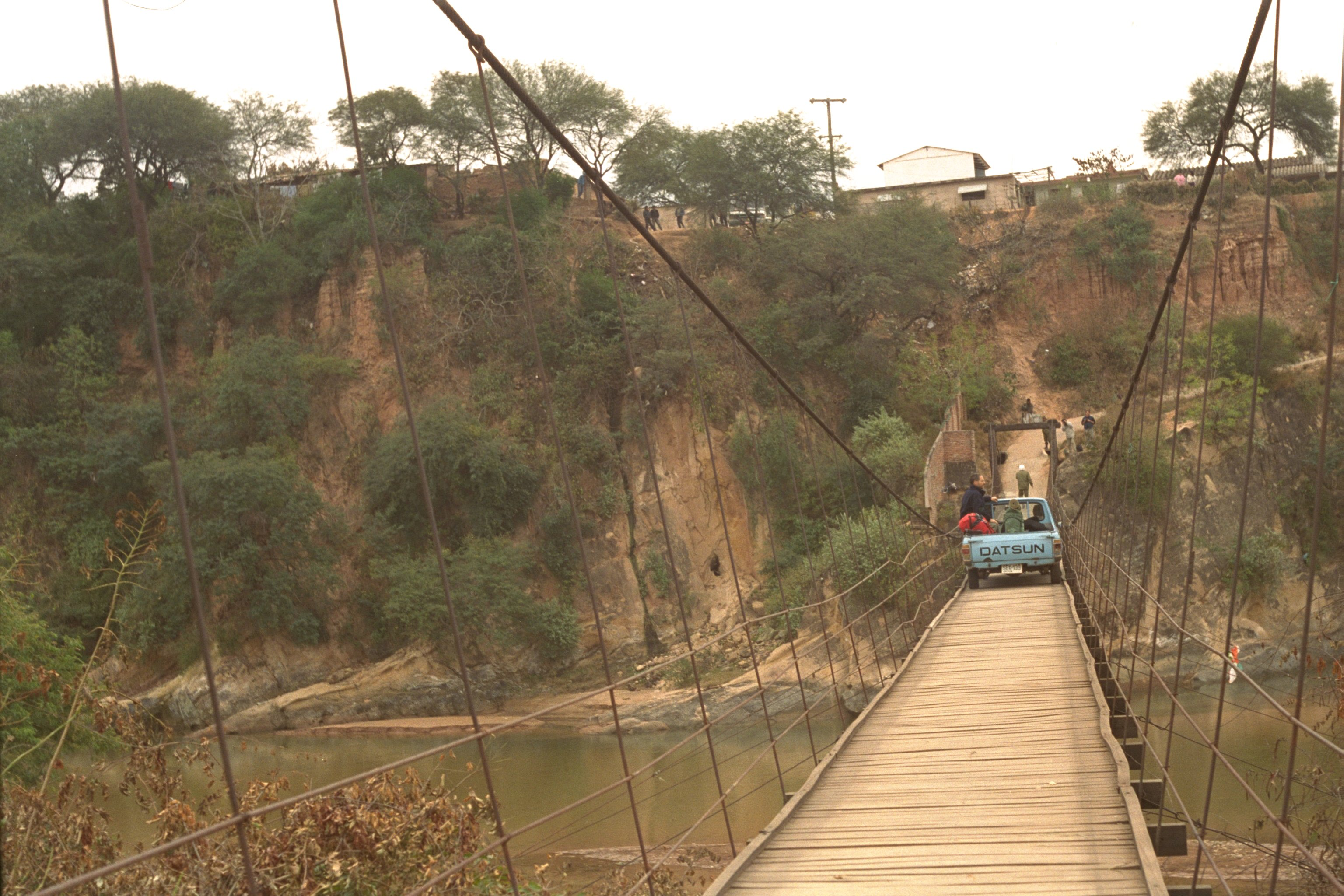 Chiquitos, Bolvia